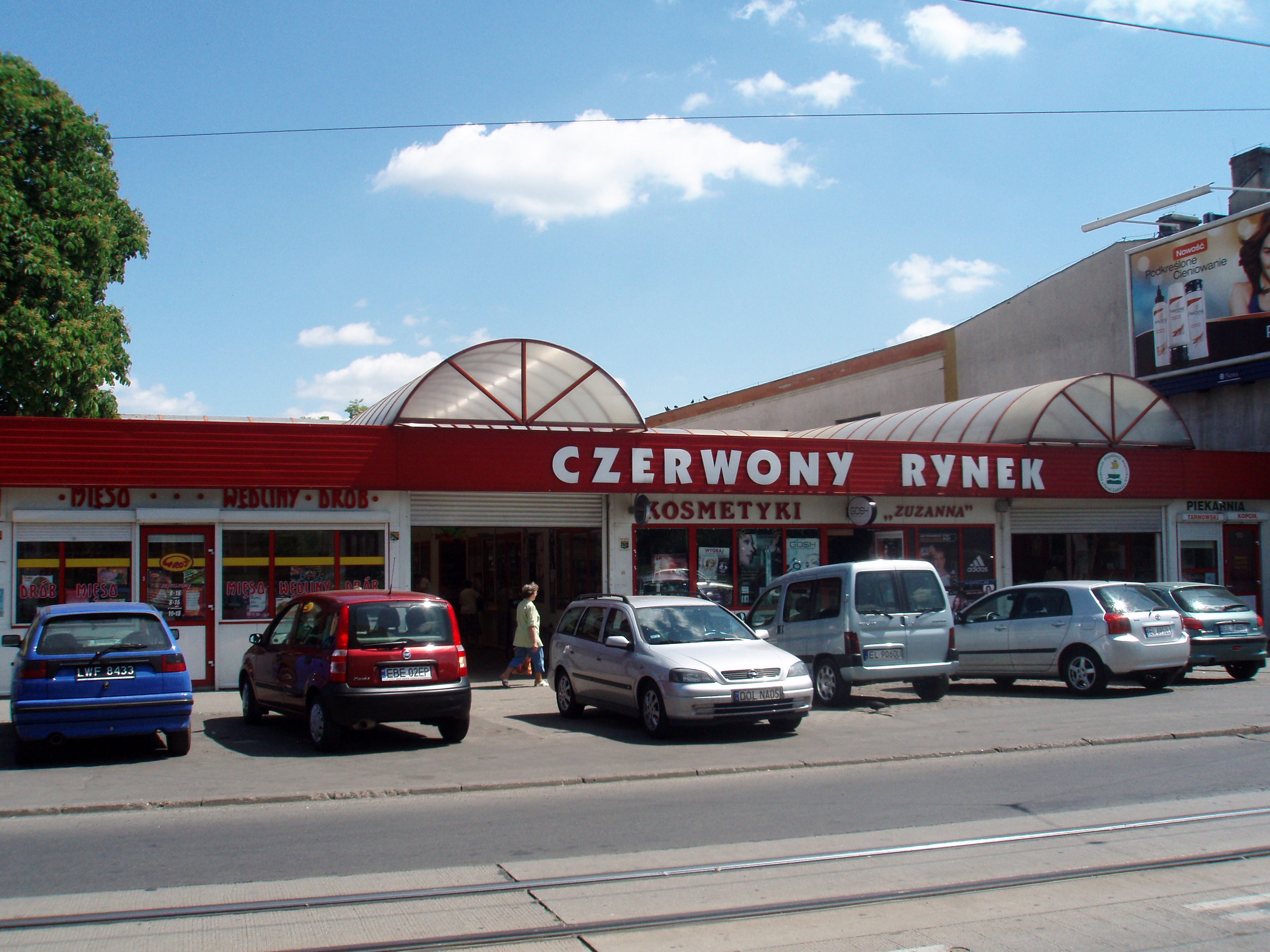 Czerwony Rynek - cz. południowa, widok od ul. Rzgowskiej (sklepy; mięsny, drogeria, piekarnia)